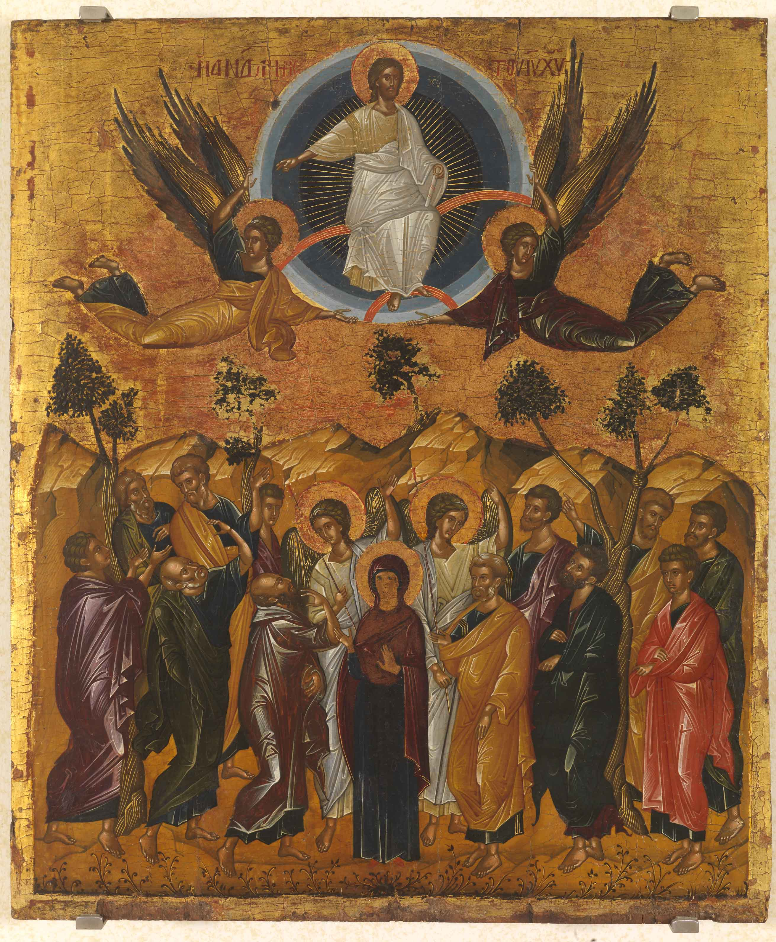 Η Ανάληψη δεύτερο μισό 15ου αιώνα, 55,5x66,2εκ. άγνωστος ζωγράφος του Χάνδακα Ο Χριστός με ενδύματα απαστράπτοντα από φως ανεβαίνει στον ουρανό, μέσα σε στρογγυλή δόξα, που κρατούν δύο άγγελοι. Στο έδαφος βρίσκονται οι απόστολοι σε δύο ομάδες γύρω από τη Θεοτόκο, την οποία πλαισιώνουν δύο λευκοντυμένοι άγγελοι. Στο βάθος εικονίζεται το όρος των Ελαιών.